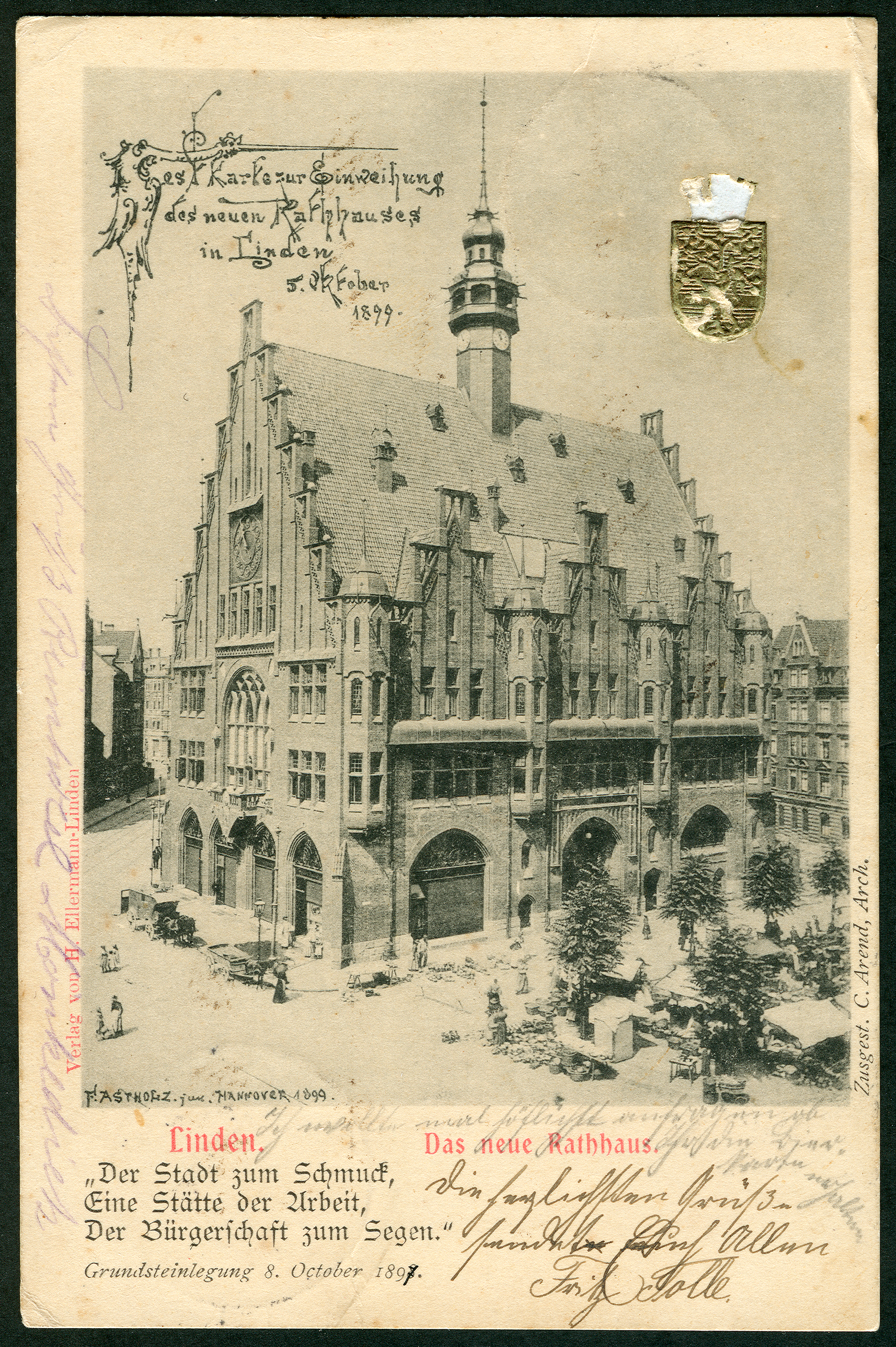 Nicht fortlaufend nummerierte, im „Verlag von H. Ellermann. Linden“ als Lichtdruck und Ansichtskarte reproduzierte Aufnahme des in Hannover tätigen Fotografen Friedrich Astholz junior. Unter dem rot gedruckten Titel „Linden. Das neue Rathaus.“ findet sich der Spruch „Der Stadt zum Schmuck, / Eine Stätte der Arbeit, / Der Bürgerschaft zum Segen.“ Darunter der Hinweis mit einer handschriftlichen Korrektur auf die „Grundsteinlegung 8. October 1897.“ Während auf dem Vordruck oben links sich mit einer offensichtlich nachträglich handschriftlich aufgebrachten Zierschrift der Hinweis findet auf die „Karte zur Einweihung des neuen Rathauses in Linden 5. Oktober 1899“ wird unten rechts neben dem Bild auf die Fertigstellung des Gebäudes durch den Lindener Architekten Carl Arend hingewiesen. Die Aufnahme zeigt vor dem Neubau ist das Treiben auf dem Lindener Marktplatz, während auf der Schauseite des Rathauses zwei mit Pferden angespannte Kutschen auf spätere Dienste warten. Oben rechts auf der Karte ist das goldfarben erhabene geprägte Wappen der Stadt Linden vorgedruckt; die leichte Beschädigung machte die Karte für den Sammlermarkt erheblich preisgünstiger. Möglicherweise handelt es sich bei der nicht nummerierten Ansichtskarte und im Verlag der Buchhandlung Hermann Ellermann erschienenen Karte um eine der frühesten bekannten Ansichtskarten aus dem Werk des Fotografen Friedrich Astholz junior, der später mehr als 1000 fortlaufend nummerierte Ansichtskarten vor allem mit Ansichten aus Hannover produzierte. Das hier gezeigte Stück wurde von mehreren Personen mit Grüßen versehen an den auf der umseiten Adressseite genannten Joh. Hüther in Hildesheim (siehe unten) ...